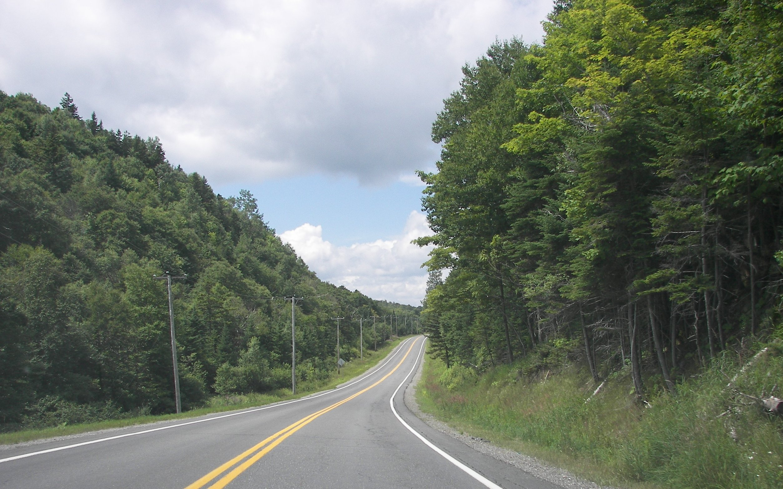 Route 212 entre Woburn et Notre-Dame-des-Bois; à droite, le mont Scotch.